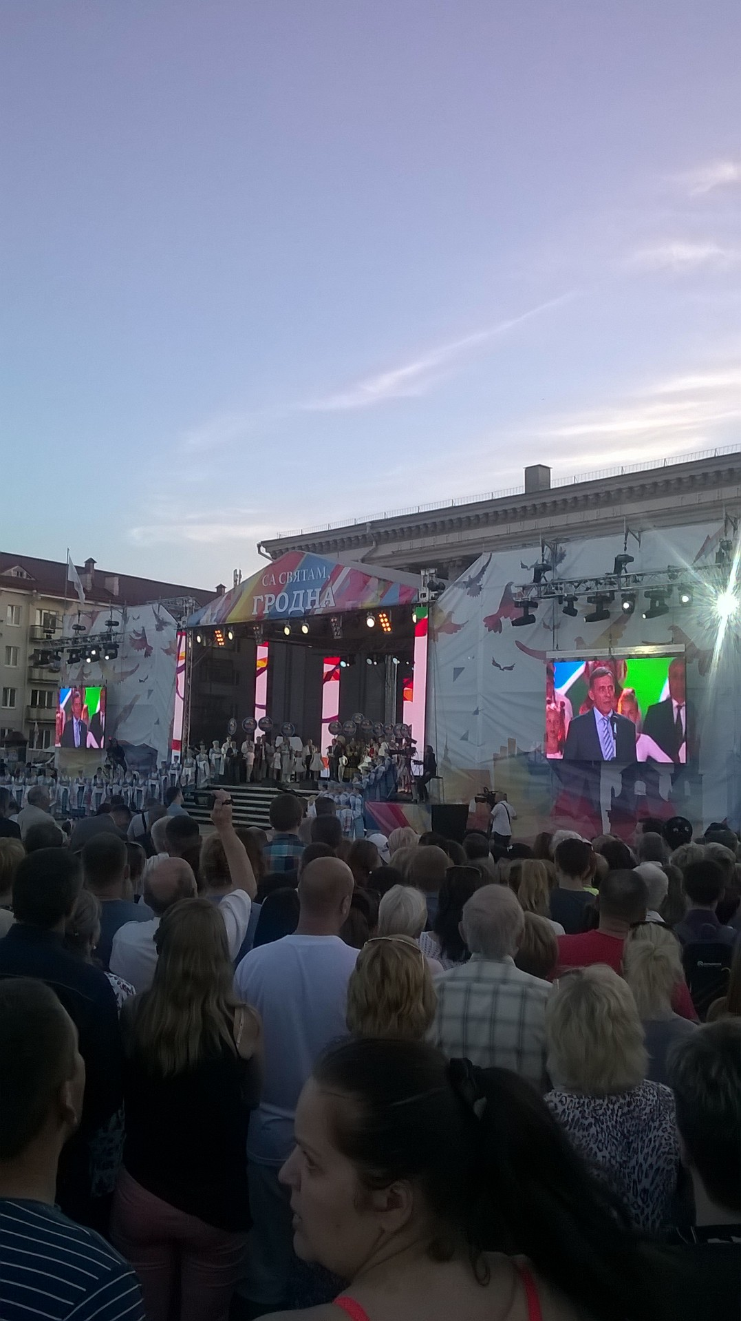 Фестывальная сцэна на плошчы Савецкай падчас ХII Рэспубліканскага фестывалю нацыянальных культур у Гродна 1 чэрвеня 2018 года.